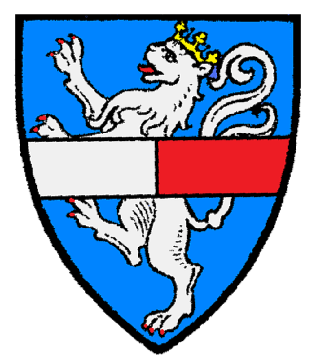 Wappen der Walsh, später auch "Wallis" [1]